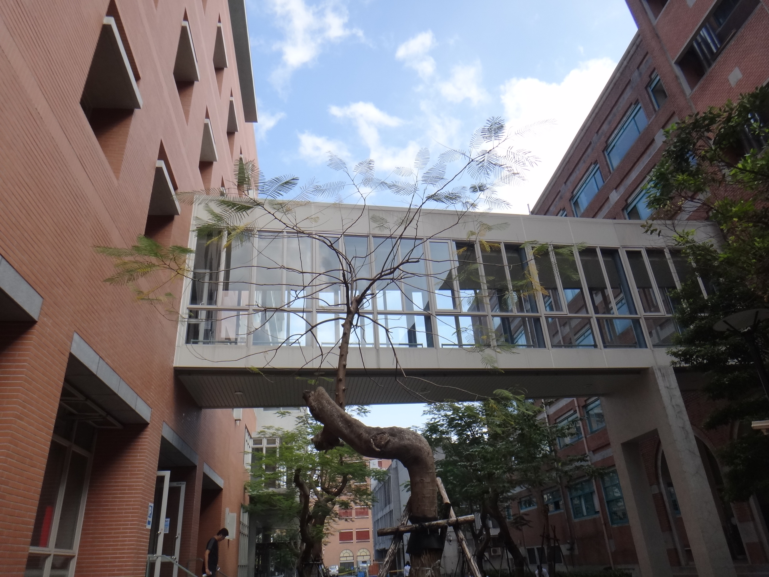 中文（台灣）: 台灣大學博雅教學館-空橋